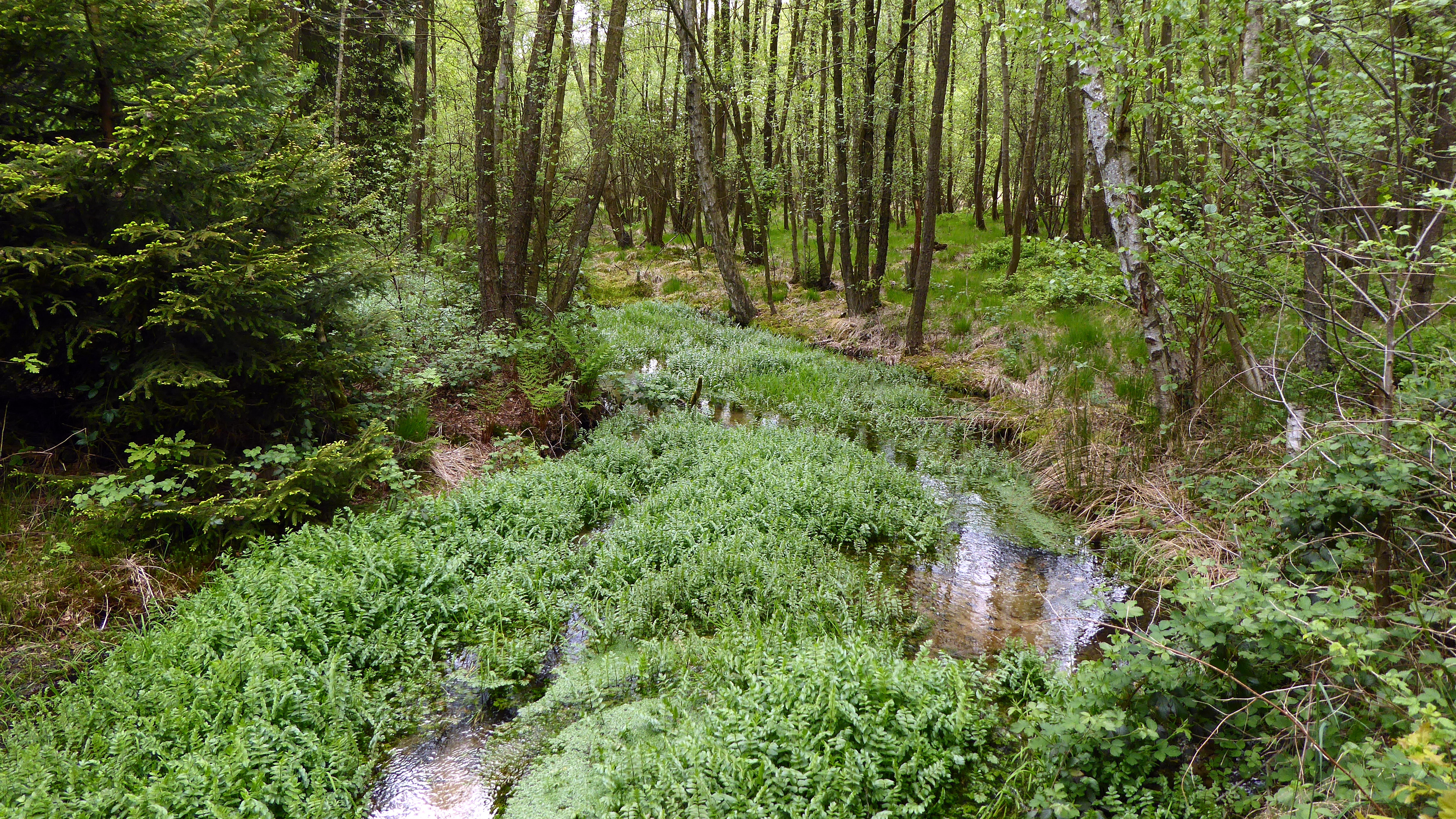 Der Räber Spring, ein Zufluss der Hardau, zeigt einen naturbelassenen Oberlauf eines Heidebaches.